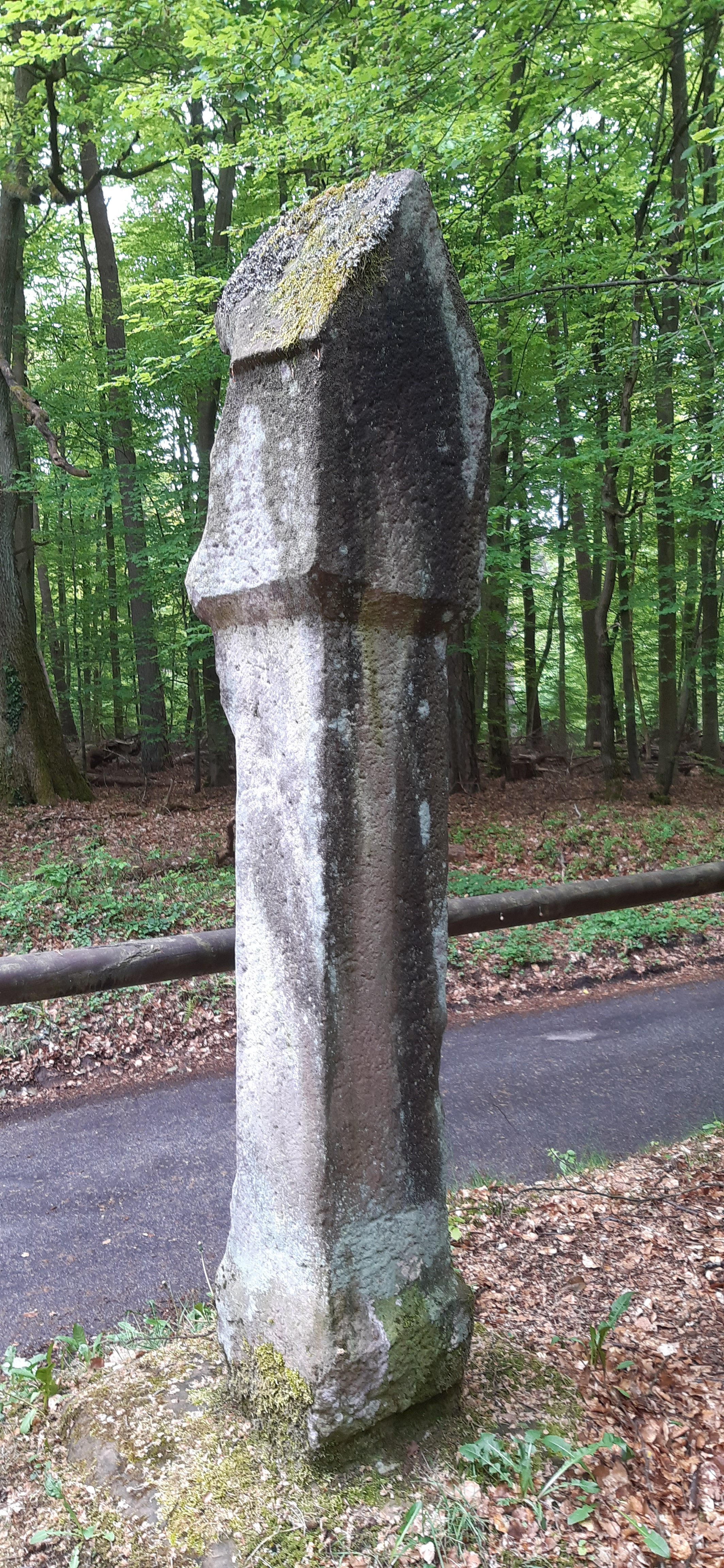 Olfener Bild, Rückansicht